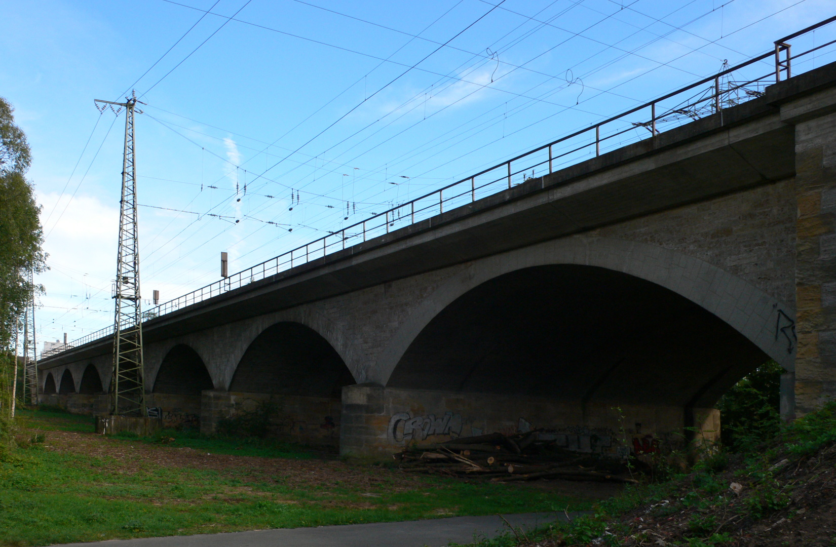 Siebenbogenbrücke in Fürth, Blick von Nordwesten auf die Brücke